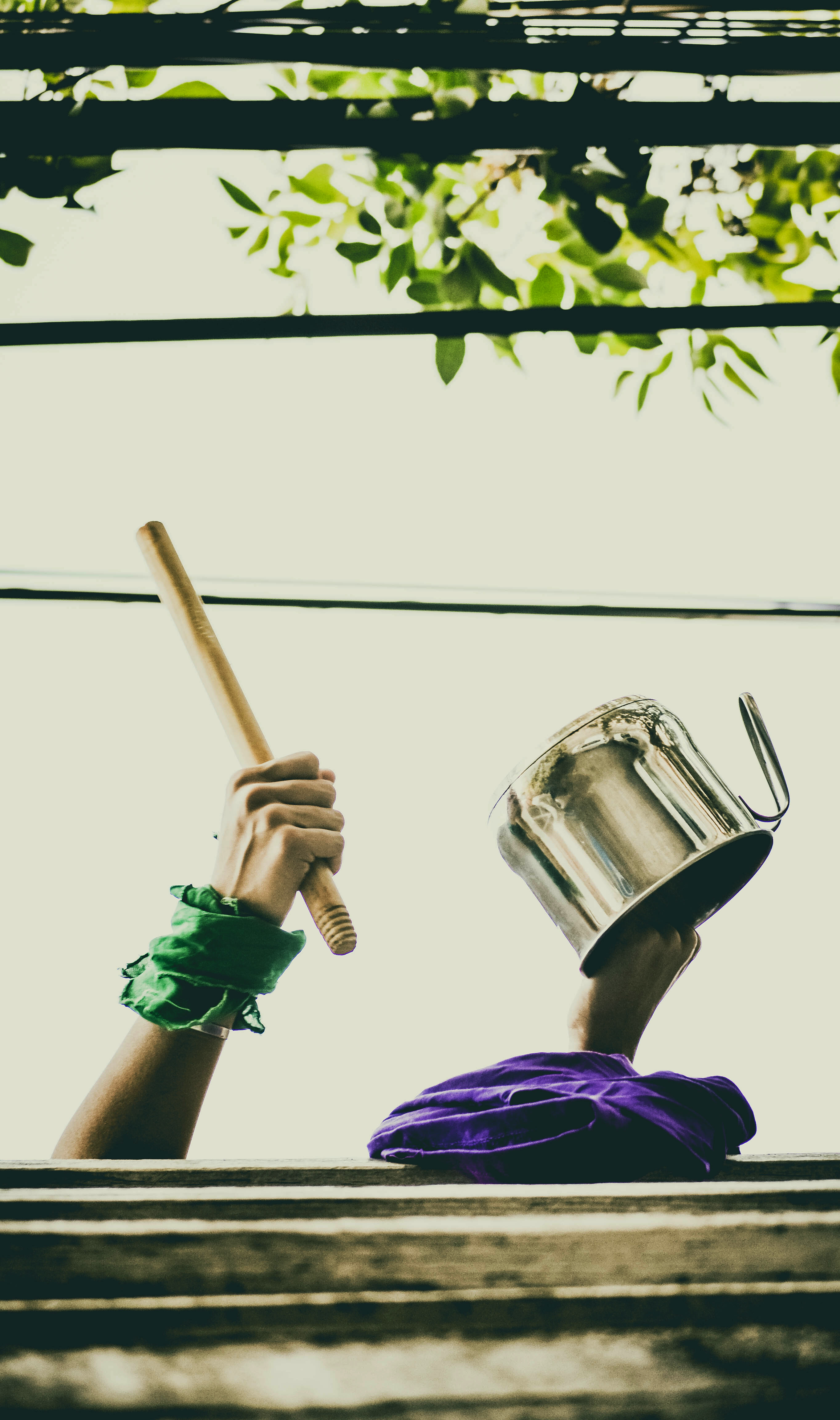 Cuarentena titi nicola covid 2019 coronavirus argentina aislamiento